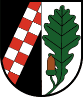 Wappen der Gemeinde Stams, Tirol „Gespalten von Schwarz mit einem in zwei Reihe von Silber und Rot geschachten Schräglinksbalken und Silber mit einem aufrechten grünen Eichenzweig mit einem Blatt und einer Eichel.“